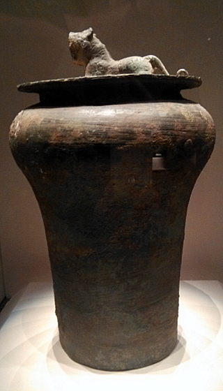 虎钮青铜錞于，汉代，传四川省成都市出土，现藏于中国国家博物馆